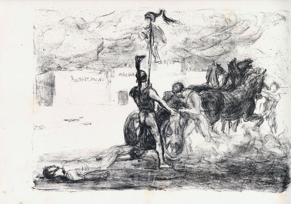 Aus „15 Lithographien zur Ilias“